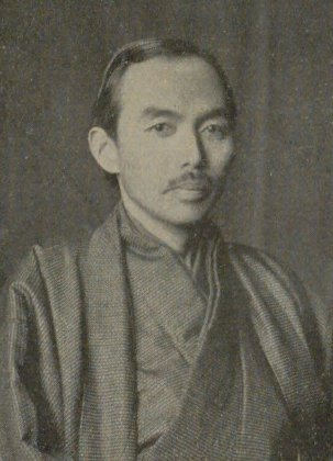 小酒井不木